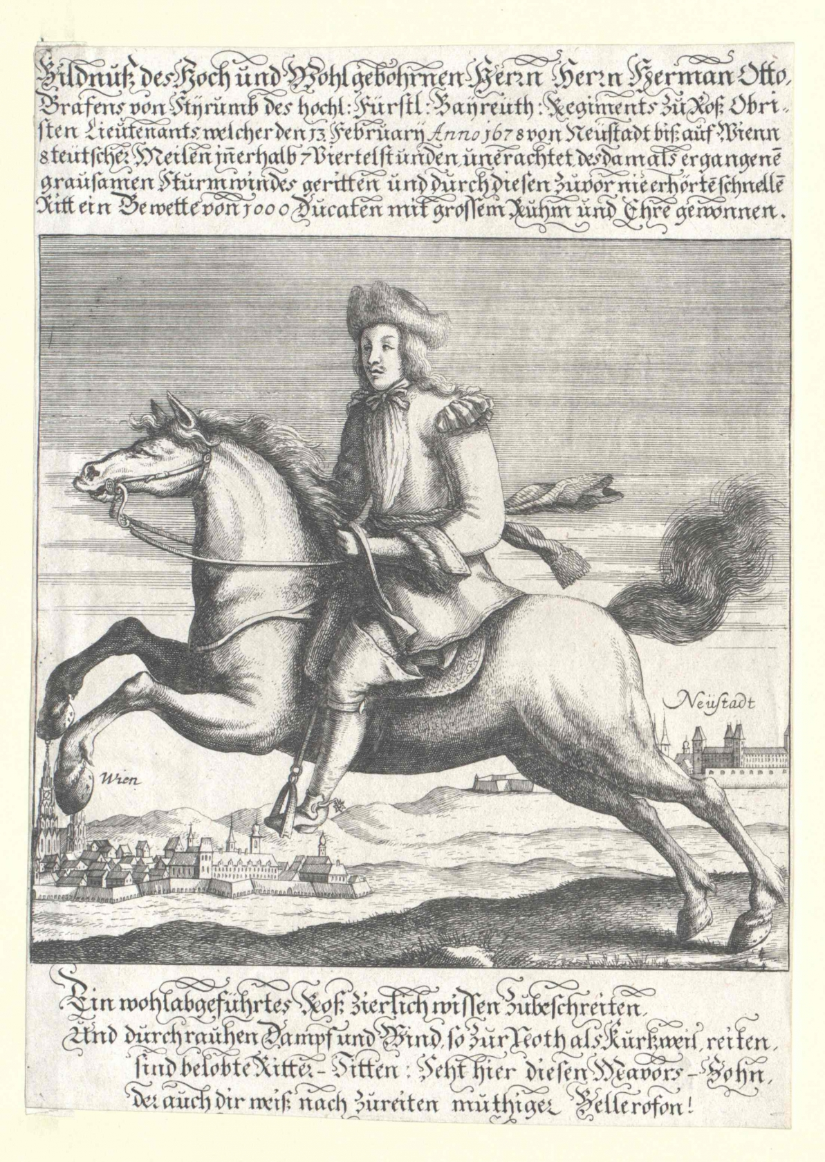 Limburg und Bronckhorst zu Stirum, Hermann Otto Graf (1645 - 1704)